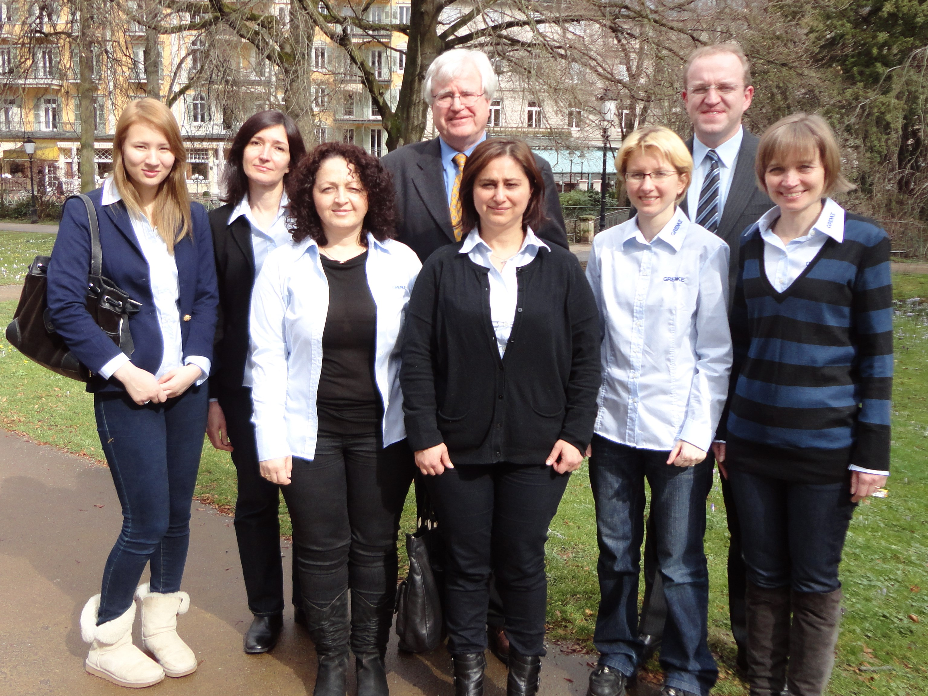 Die Mannschaft der OSG Baden-Baden, 2013 nach Gewinn der Frauenbundesliga im Schach. Von links nach rechts: Lisa Schut, Ketevan Arakhamia-Grant, Ketino Kachiani-Gersinska, Jens Thieleke, Iamze Tammert, Eva Moser, Sven Noppes und Elena Sedina.